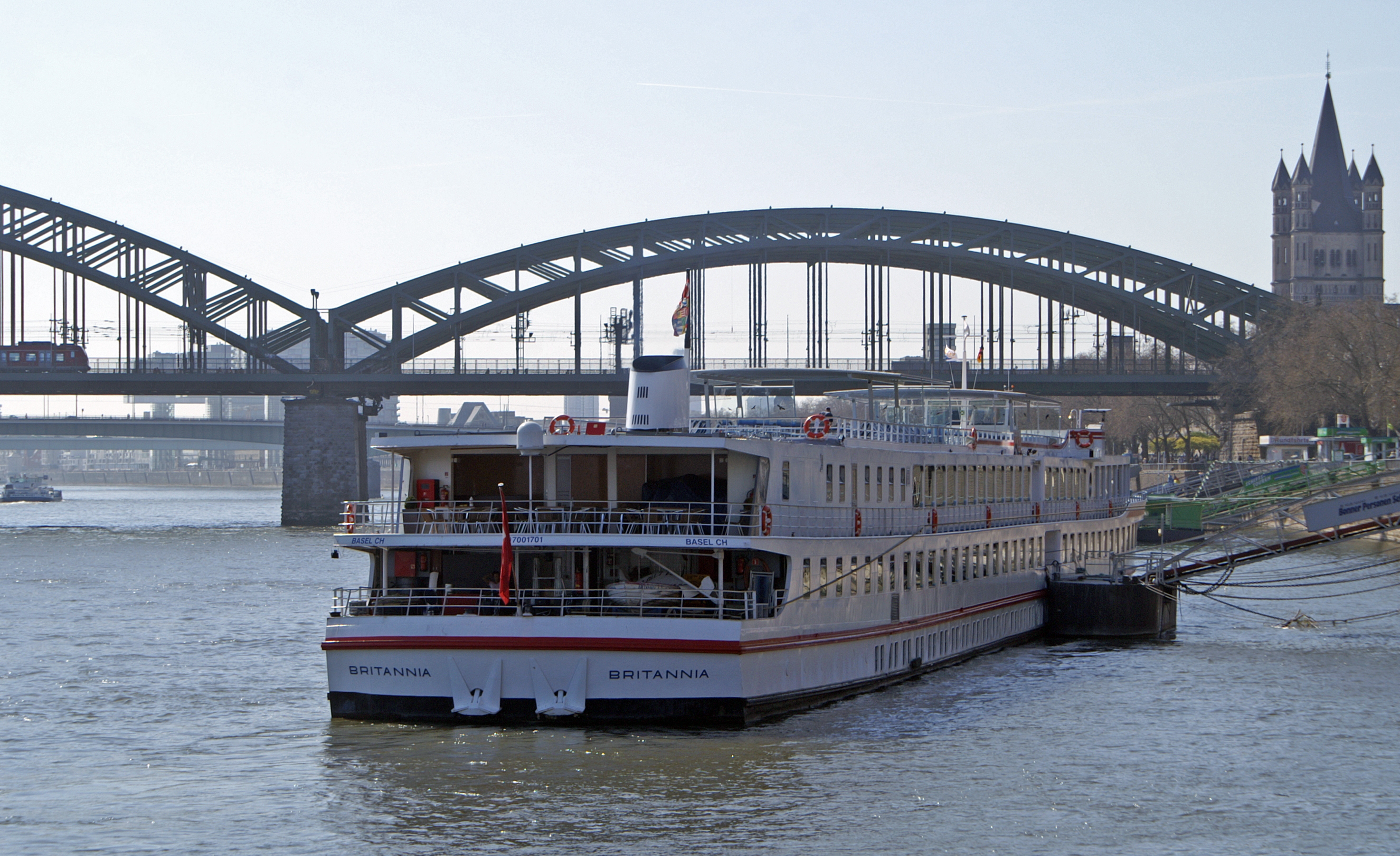 Flusskreuzfahrtschiff Britannia am Anleger Köln, Konrad-Adenauer-Ufer.